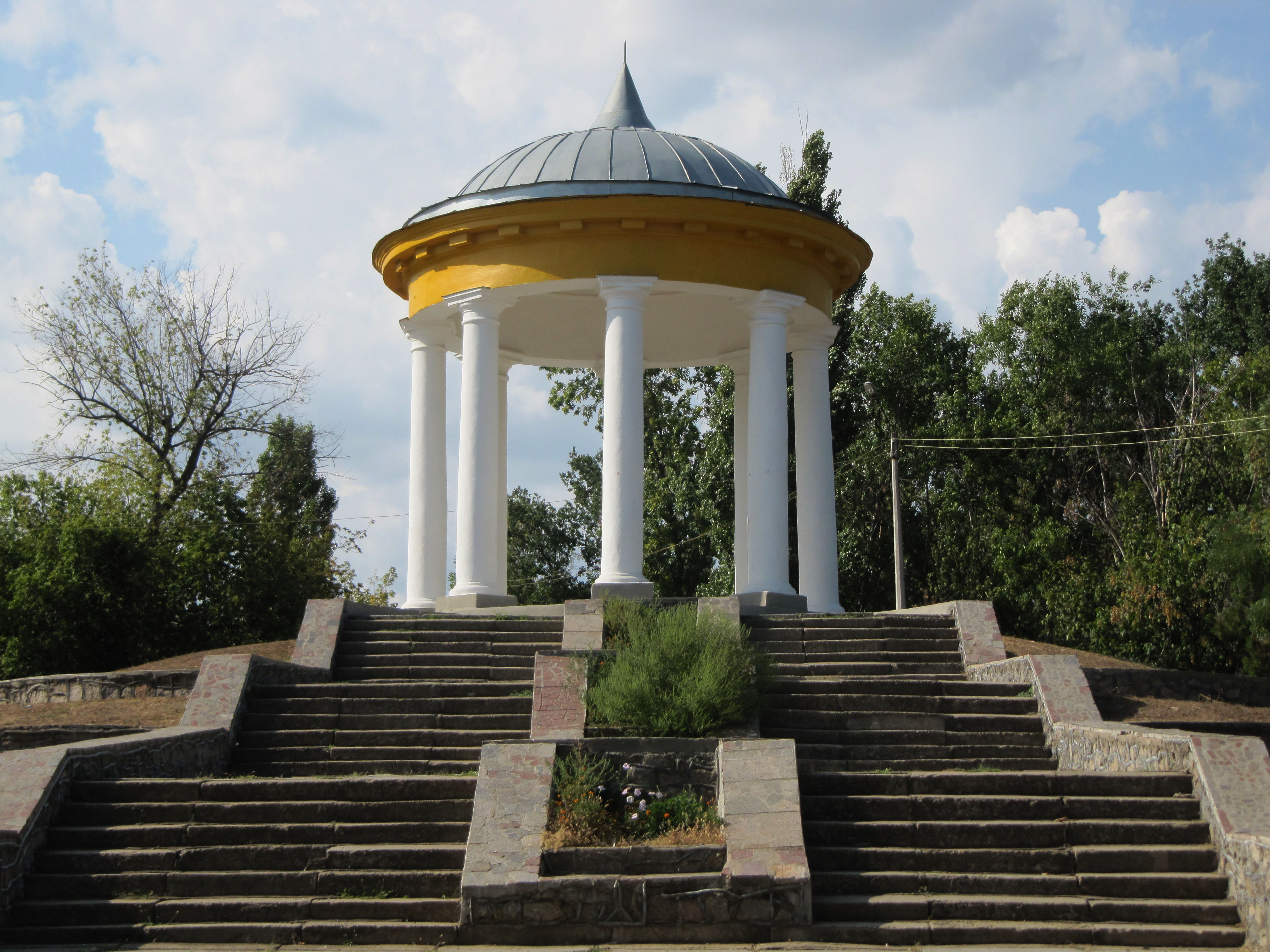 Вознесенськ, альтанка Миколаївська весна у Вікіпедії